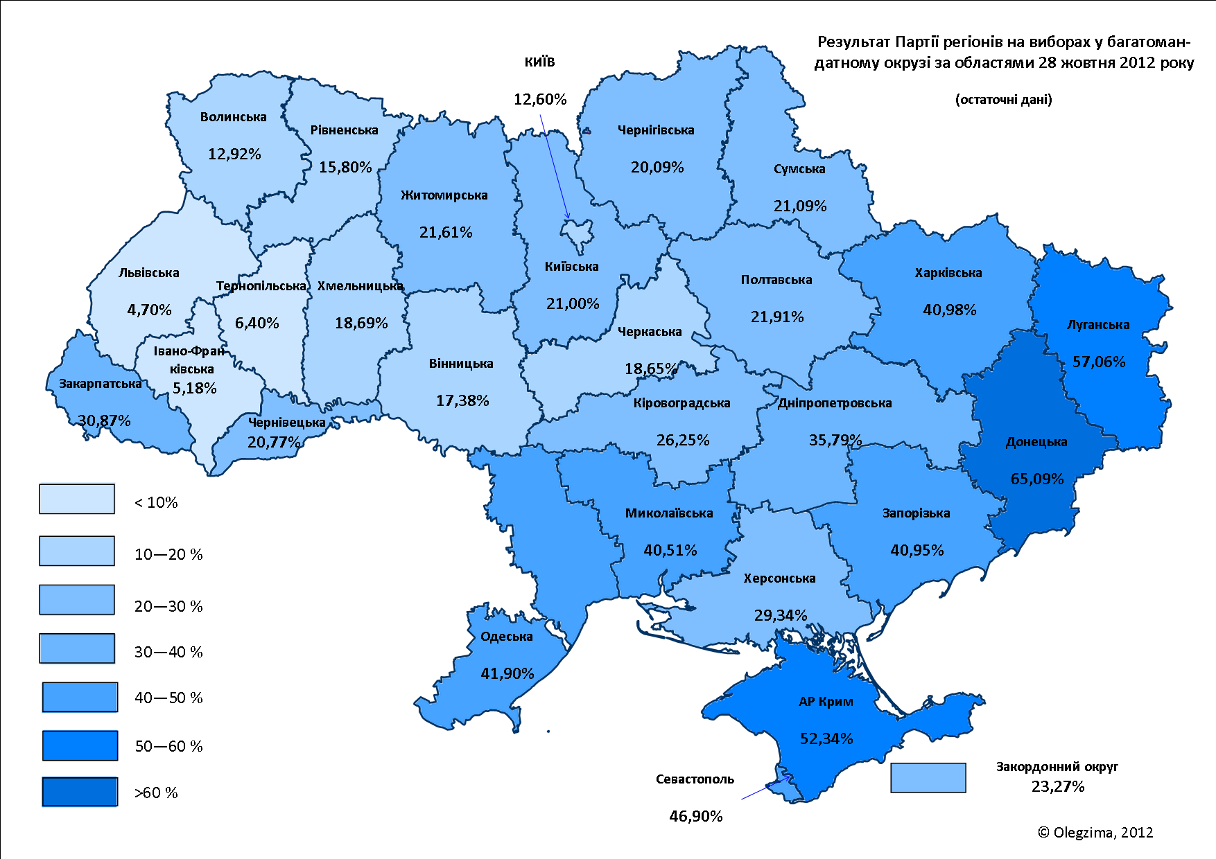 Результат Партии регионов по областям на выборах 2012-10-28 по состоянию на на 21:24 02.11.12 —99,61%